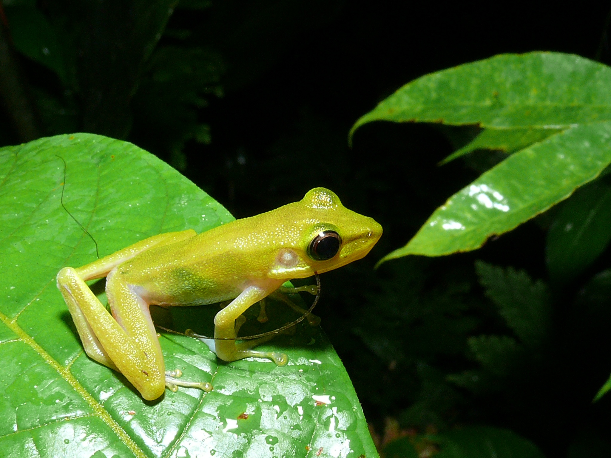 Gunung Mulu NP, Sarawak, MALAYSIA